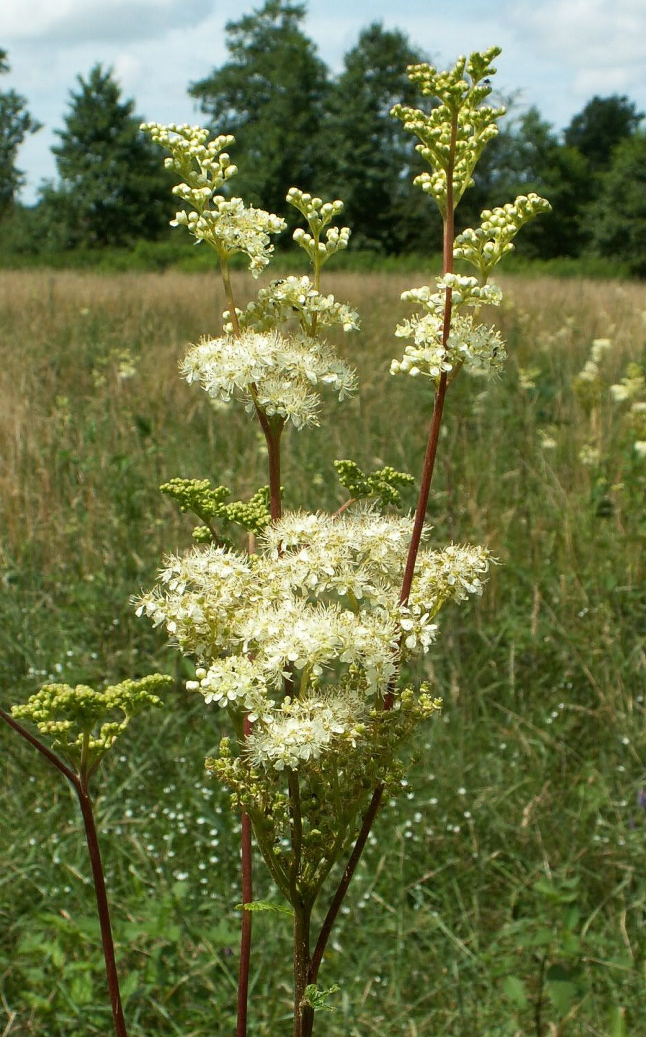 Filipendula ulmaria, inflorescence. Kleby near Golczewo, NW Poland